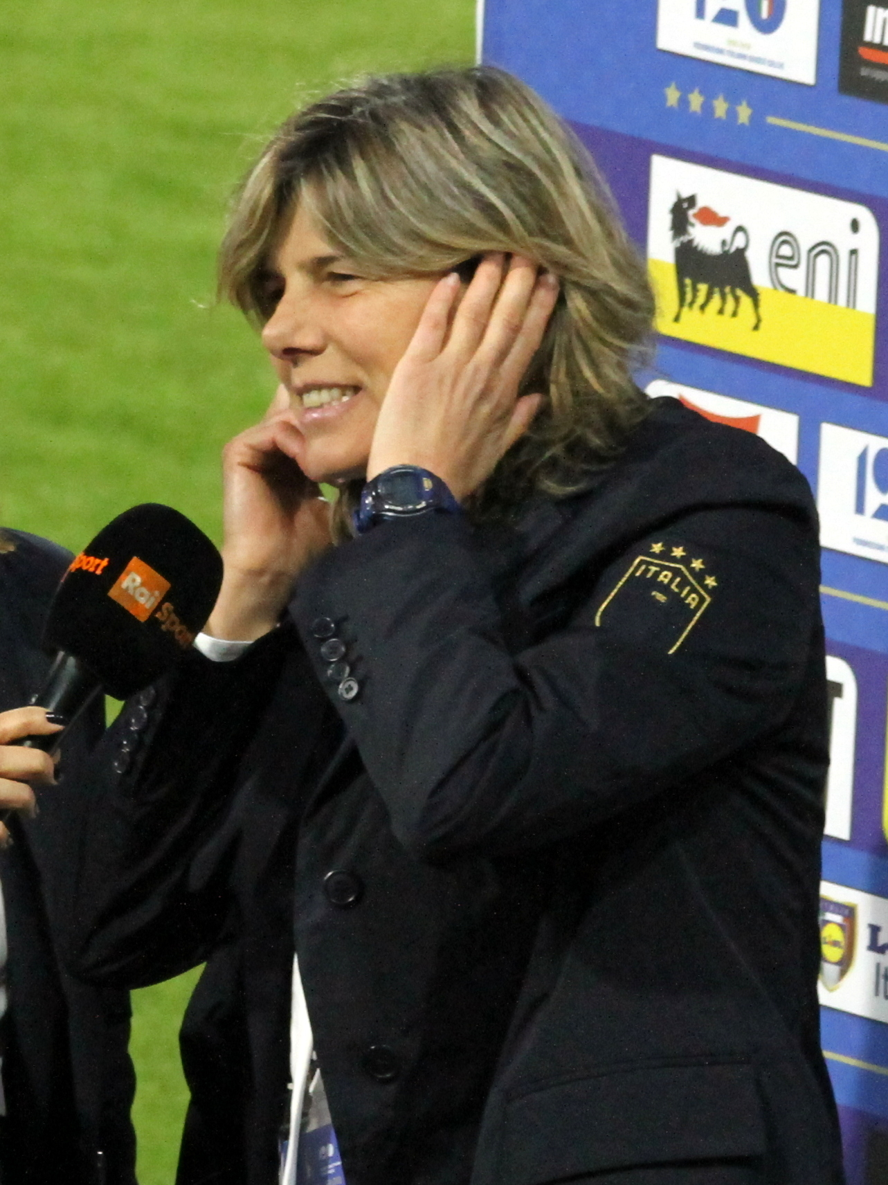 Milena Bertolini, Commissario Tecnico della nazionale di calcio femminile italiana, durante l'incontro Italia-Belgio del 10 aprile 2018 allo stadio Paolo Mazza di Ferrara.